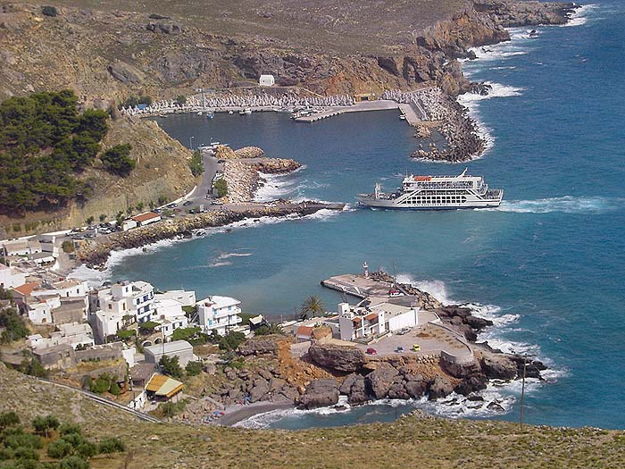 Chora Sfakion, Nomos Chania, Kreta, Griechenland